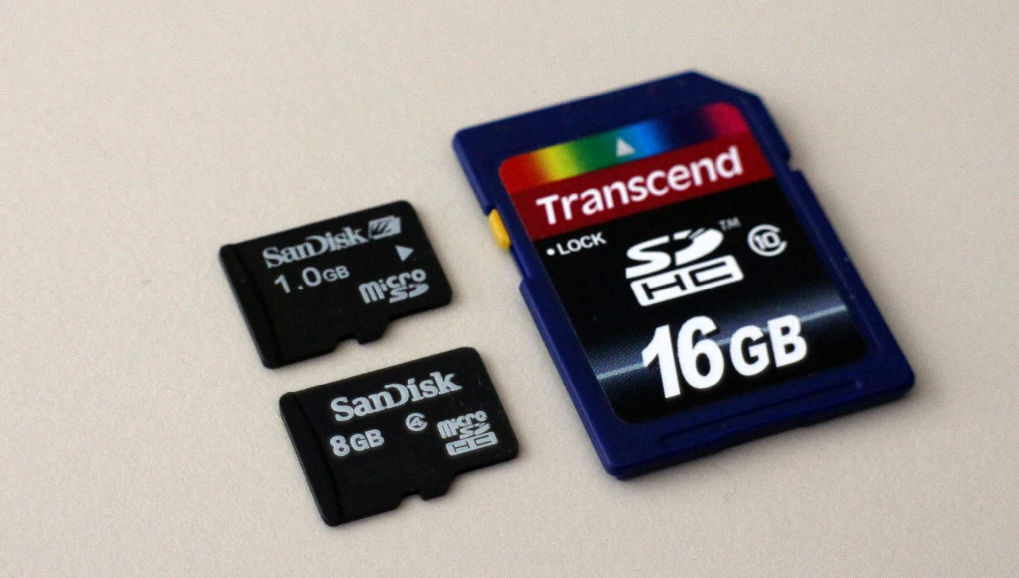 MicroSD-1G、MicroSDHC-8G與SDHC-16G記憶卡